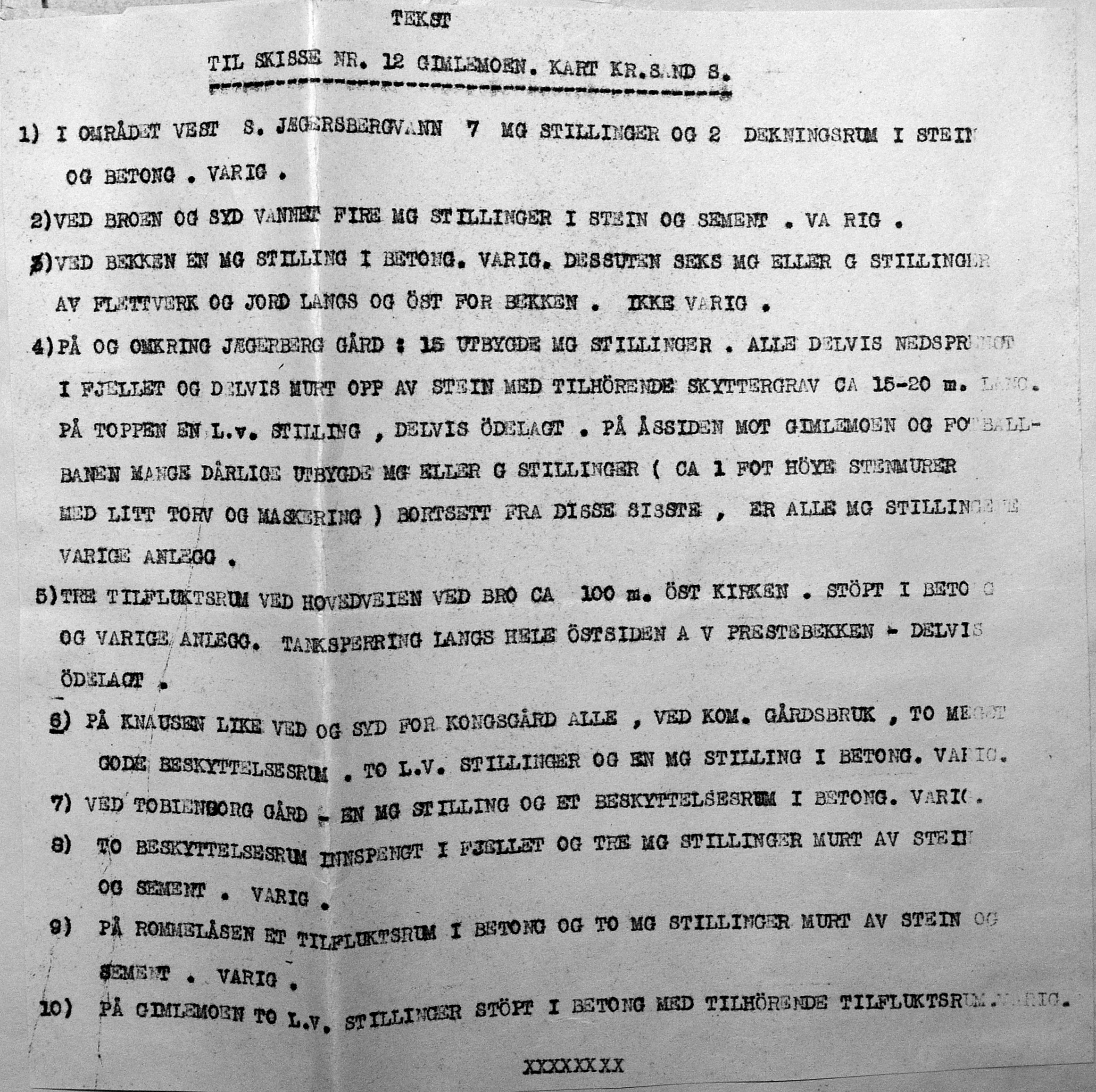 Beskrivelse til kart over Gimlemoen